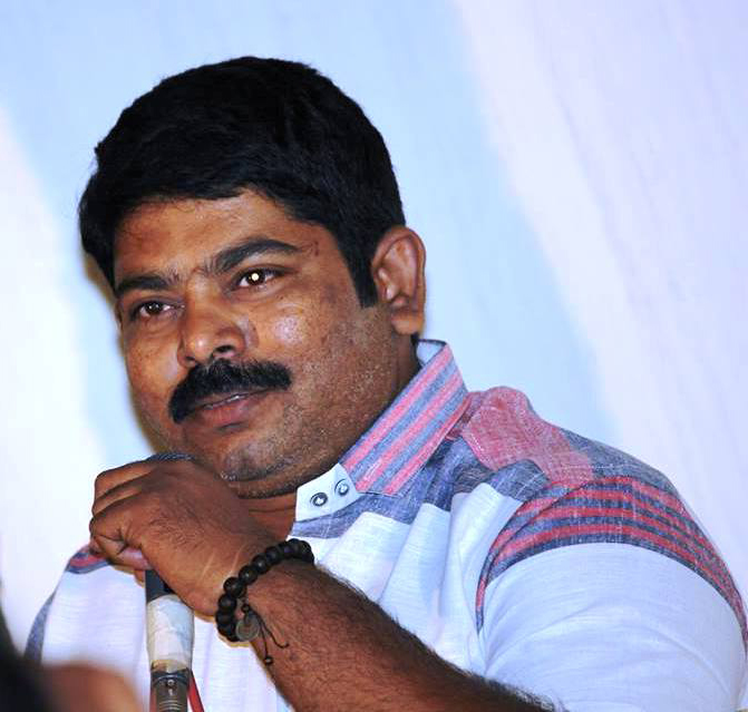 వర్మ కలిదిండి